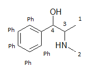 efedryna